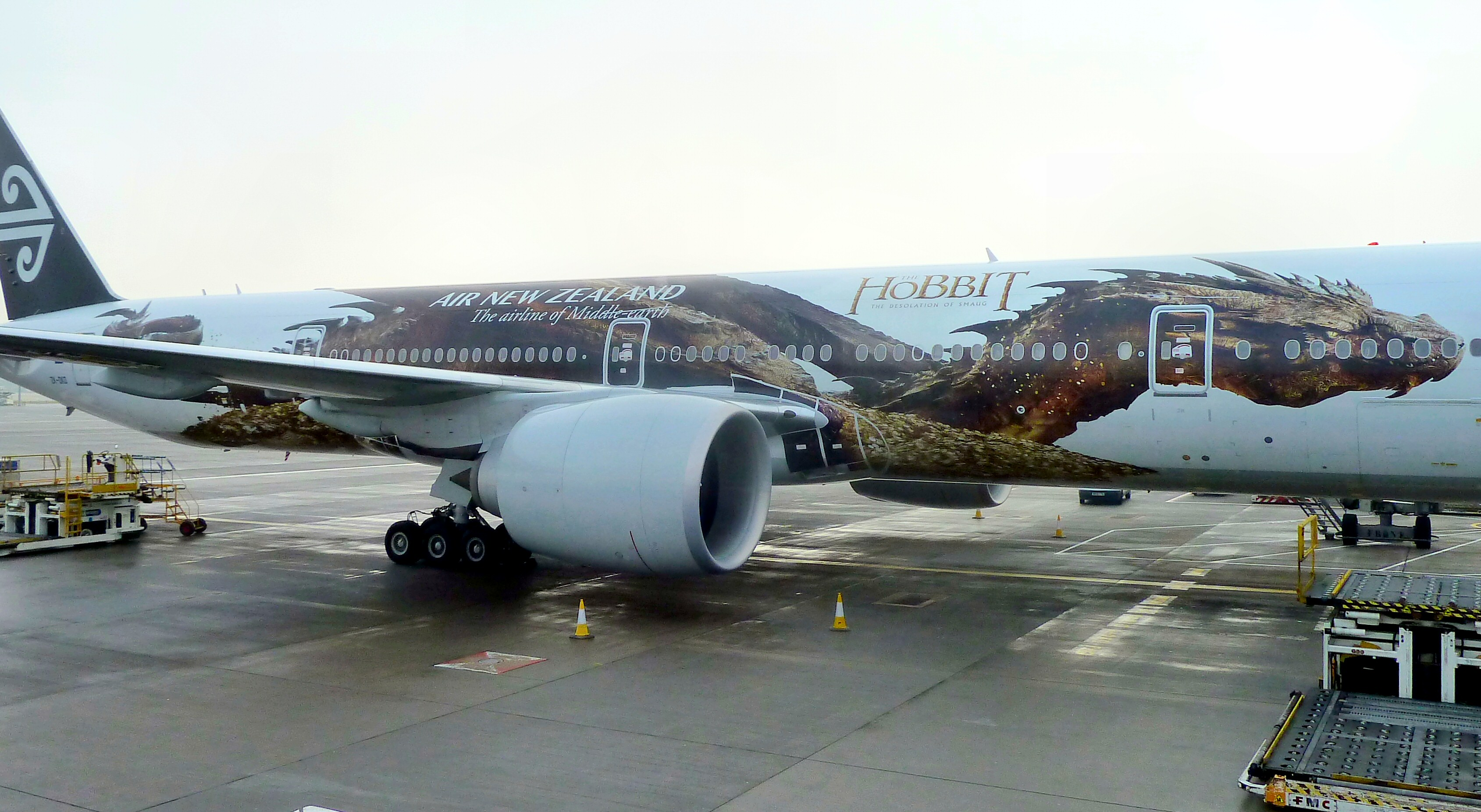 Side view of "SMAUG".....